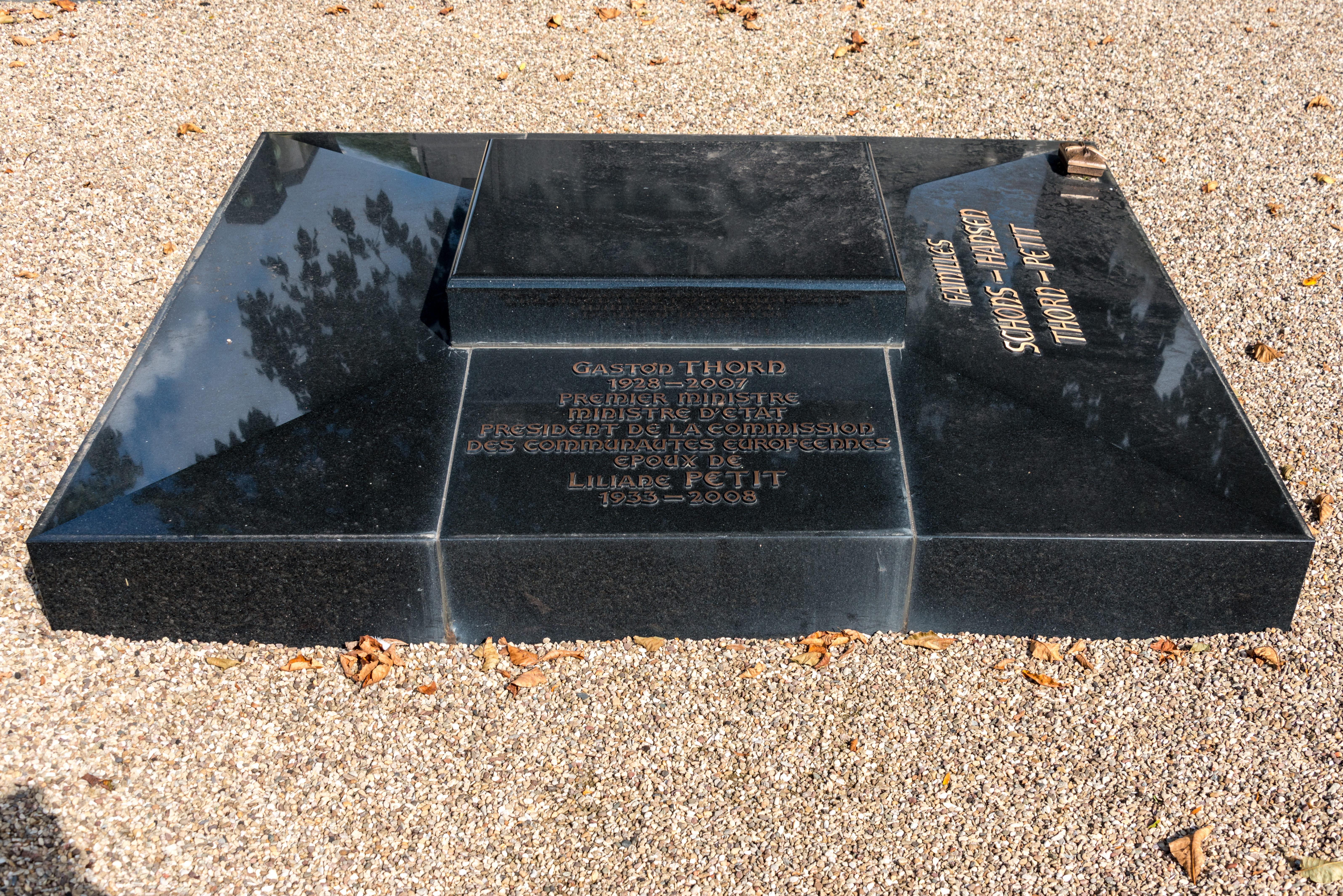 D'Graf vum Gaston Thorn a senger Fra der Liliane Petit um Nikloskierfecht.